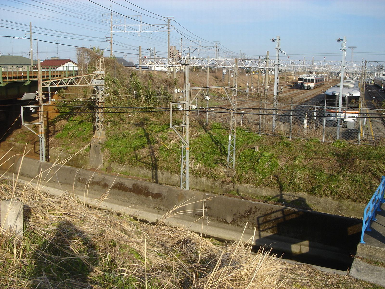 大垣車両区、大垣市にて車両区の西側より撮影。左側は東海道線。手前の水路の横を養老線が通っている。